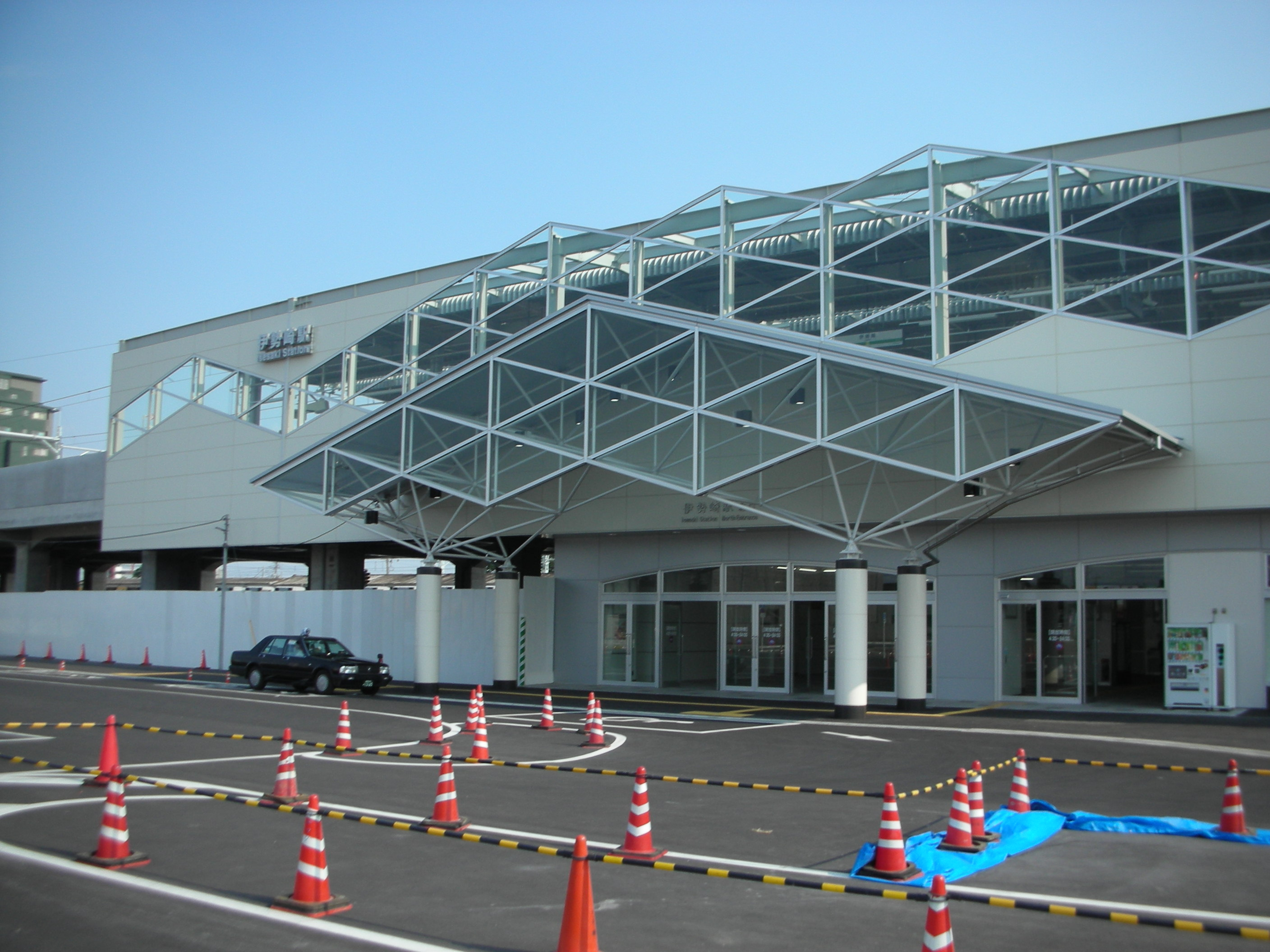 伊勢崎駅（北口）の外観。